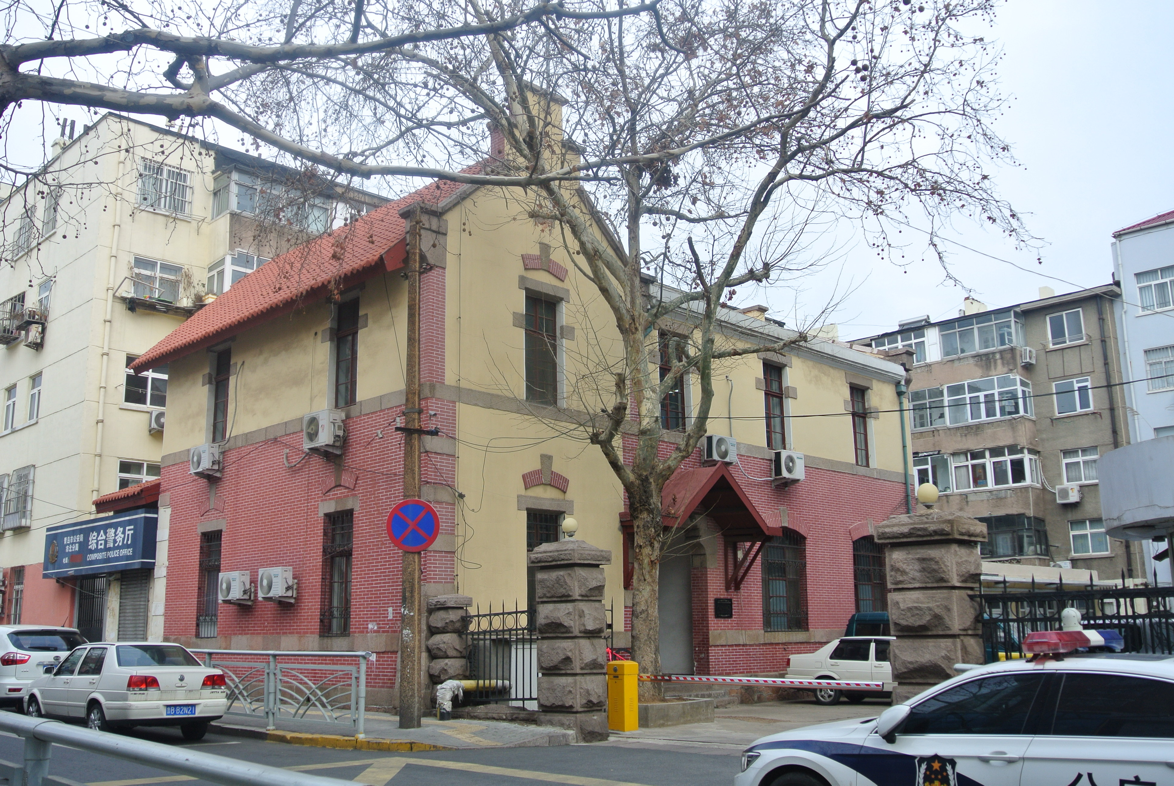 青岛台东镇巡捕房旧址